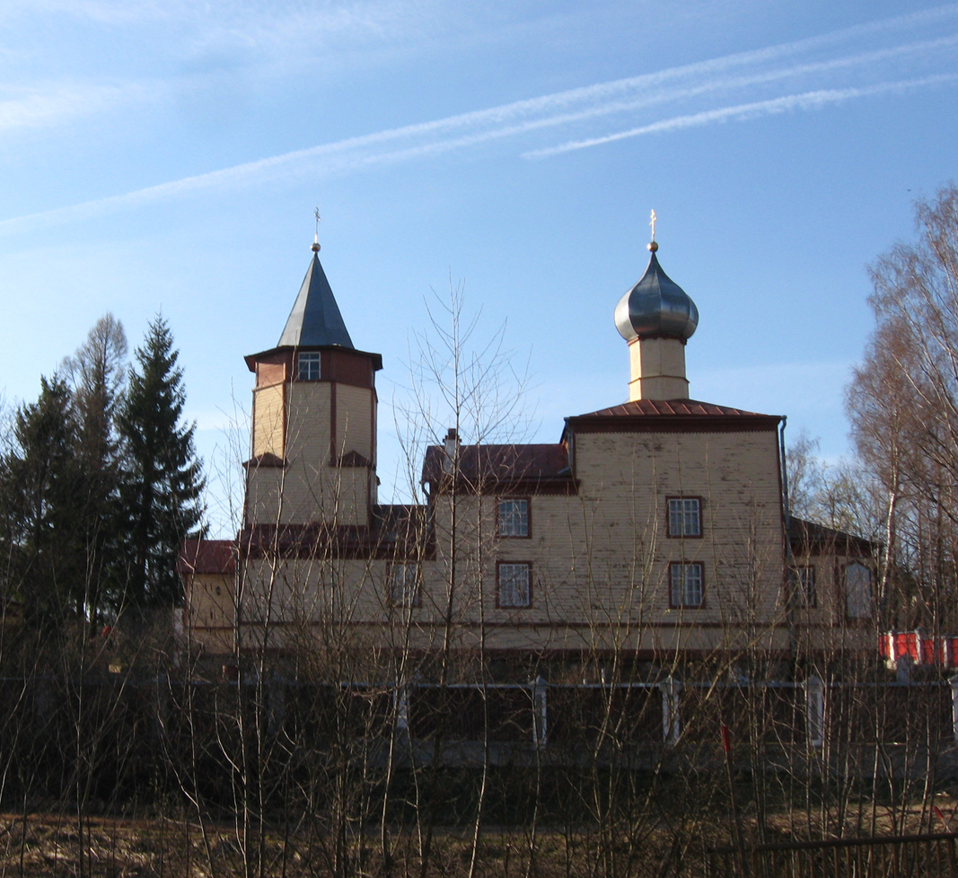 Заянье церковь святого Николая Чудотворца (апрель 2014 года).